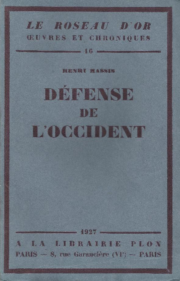 Portada de Défense de l'Occident , obra de Henri Massis.